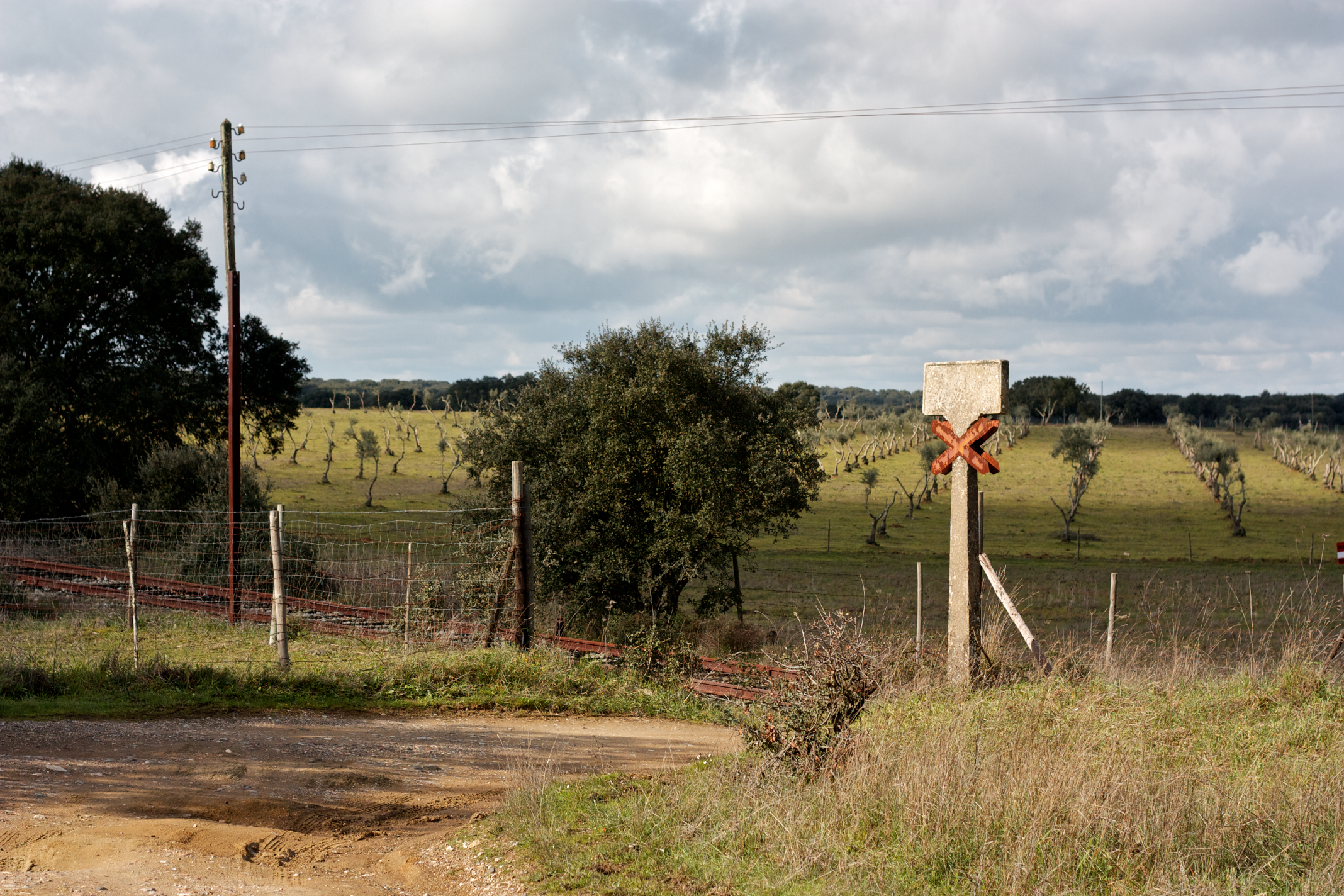 Tipo: A [Apeadeiro] Local: Ribeiro do Freixo [Linha de Évora, PK 237] Data e hora: 29 de Janeiro de 2011 [13h19]